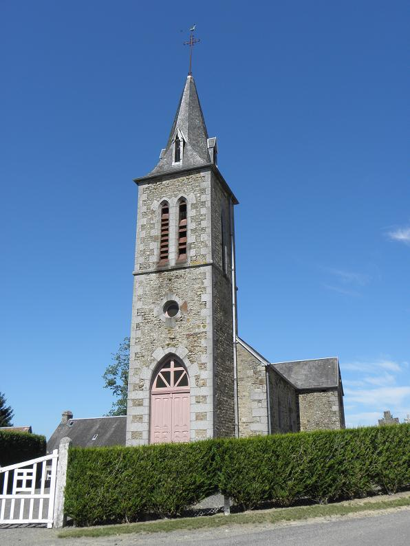 Église de Saint-Brice (50).